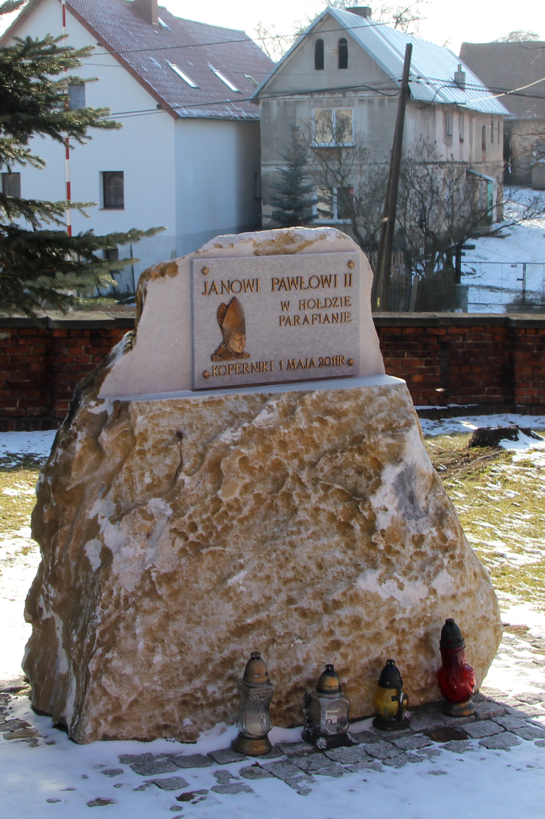 Koperniki – wieś w Polsce, w województwie opolskim, w powiecie nyskim, w gminie Nysa.